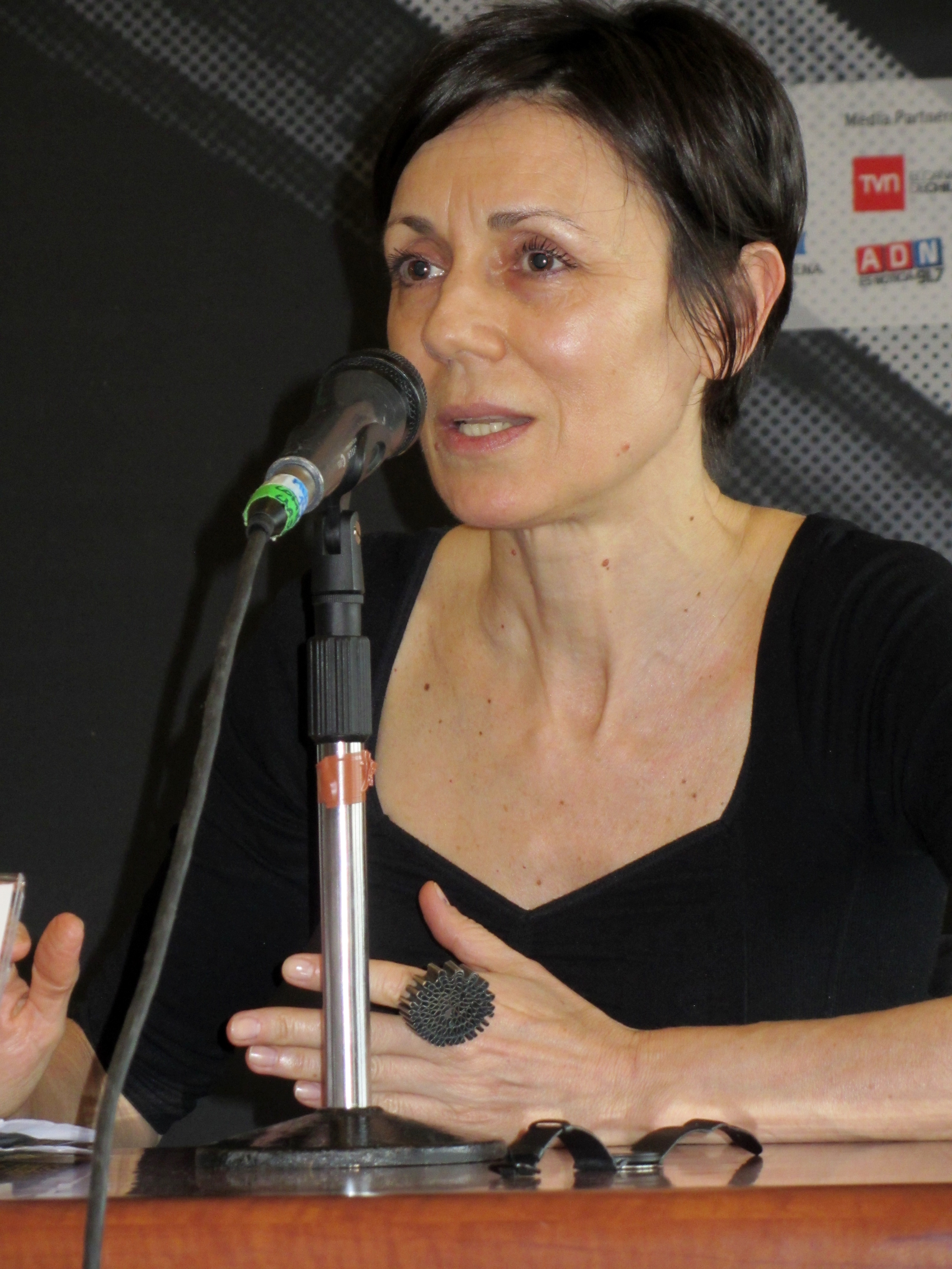 La escritora argentina María Sonia Cristoff en el Festival Internacional de Literatura de Berlín 2015